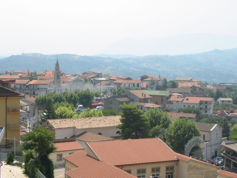 Ettore De Filippo, parte del centro abitato di Foglianise visto dal casale Palazzo